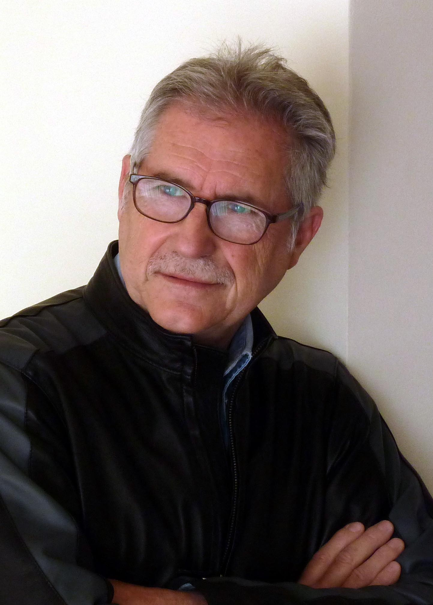 Jose Maria Alguersuari